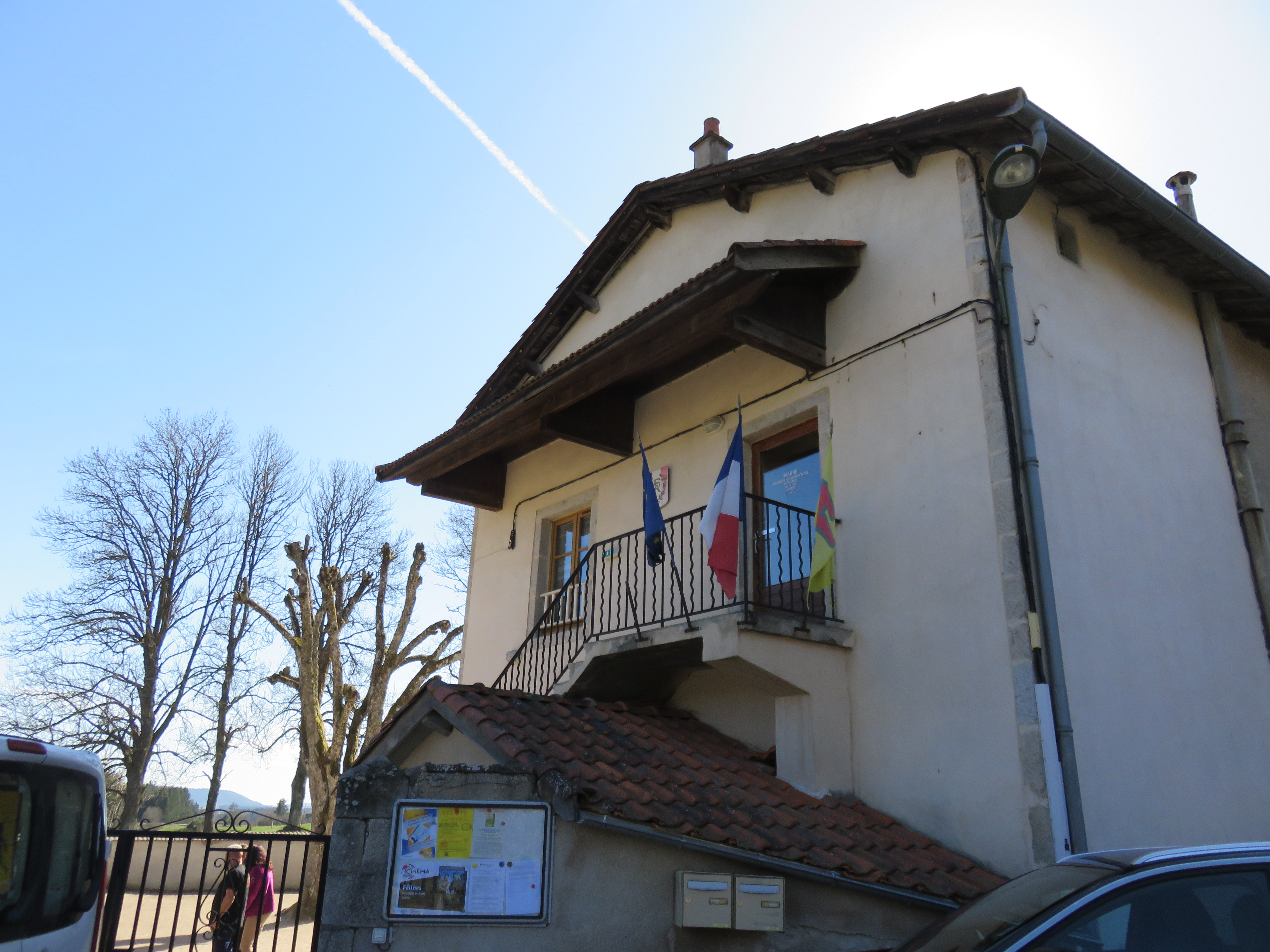 Mairie de Félines (Haute-Loire, France).